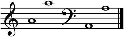 koobak